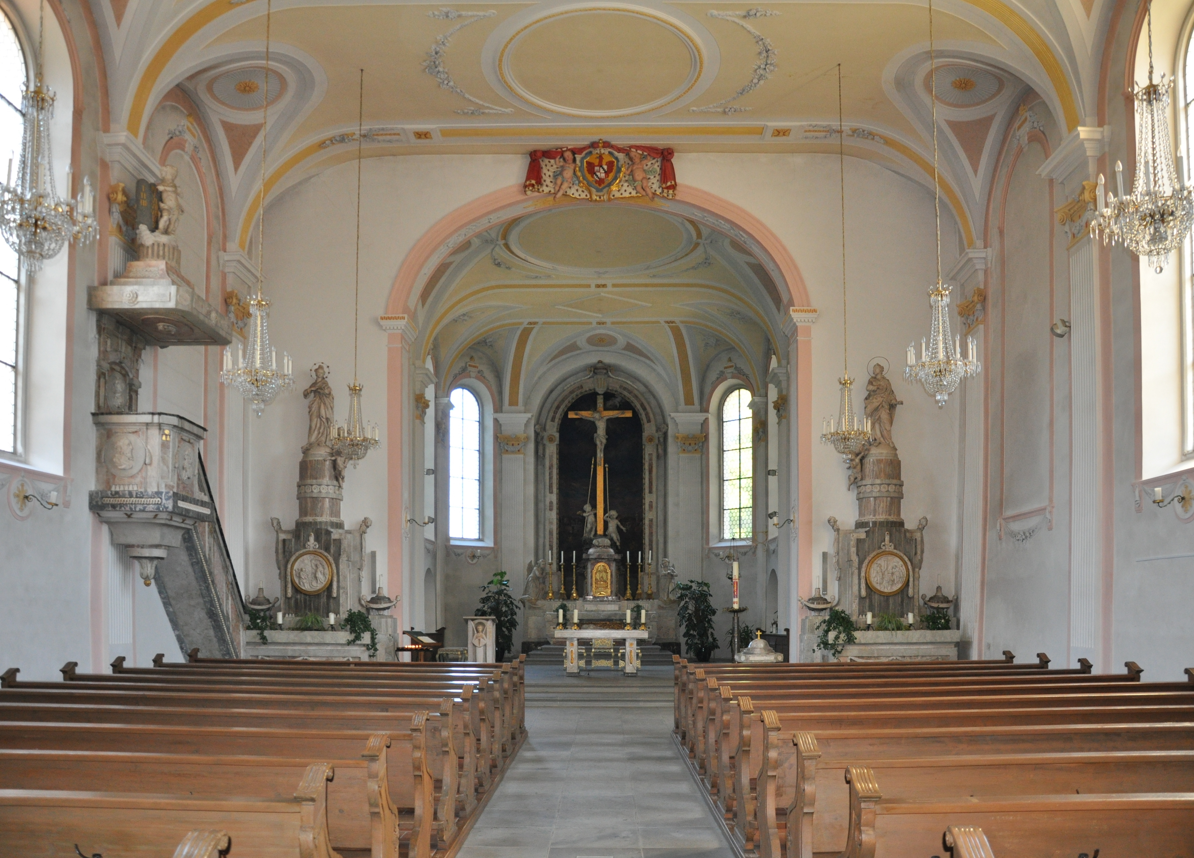 Stühlingen, Landkreis Waldshut, Heilig-Kreuz-Kirche Blick zum Chor